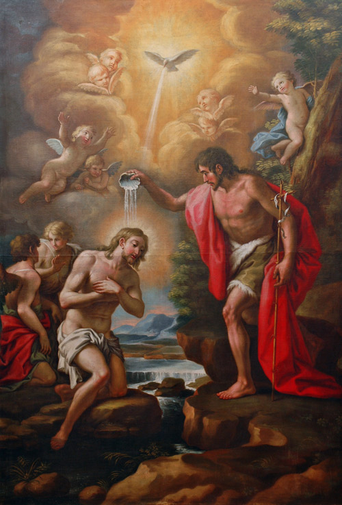 Luis Gil y Ranz: Bautismo de Cristo (1808). Óleo sobre lienzo, 205 x 142 cm, La Seca (Valladolid), Iglesia de Nuestra Señora de la Asunción. Según el certificado de compra, "Don Luis Gil Ranz, Pintor en esta Corte, pensionado por su Majestad y discípulo de la Real Academia de las Nobles Artes de San Fernando" declaraba el 10 de octubre de 1808 haber cobrado cuatro mil reales de vellón por su pintura, que es la única actualmente documentada a nombre del pintor.